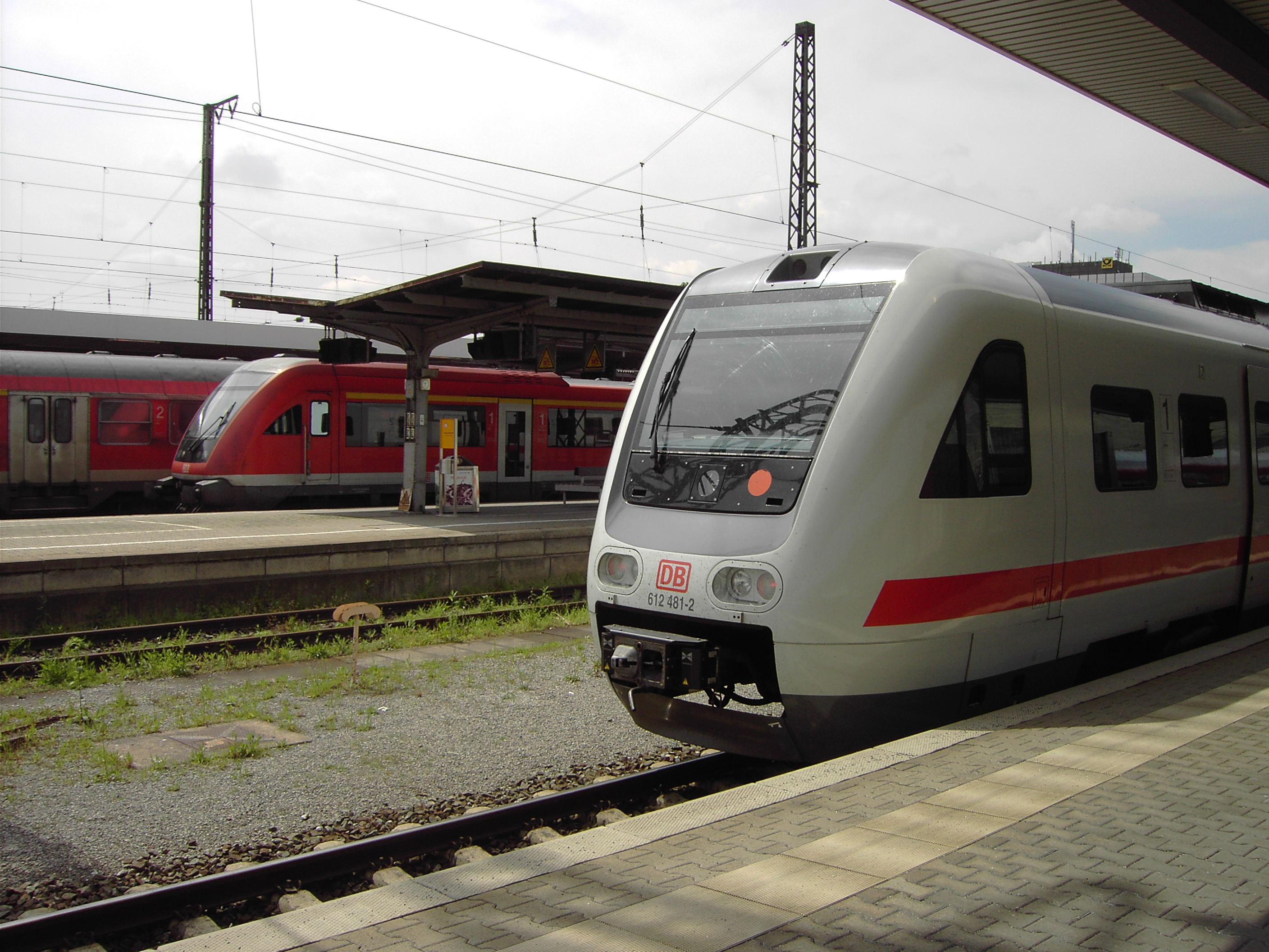 Würzburg Hauptbahnhof: Auf Gleis 8 (im Bild hinten links) steht eine Modus-Wagen-Garnitur von Frankfurt (Main) nach Nürnberg und auf Gleis 10 (im Bild vorne rechts) drei Einheiten der Baureihe 612 zur Fahrt nach Hof mit Zugteil nach Bayreuth.